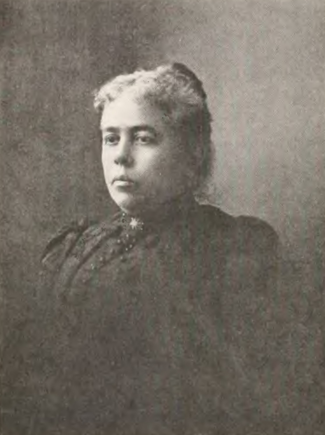 Photocopy